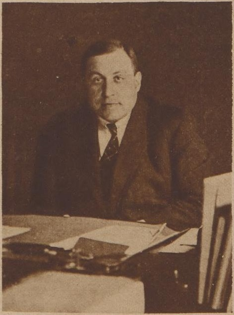 Gerrit Jansen (1890-1956). Onderschrift: "Hierboven een foto van Mr. G. Jansen, ex-directeur van de Centrale tot Voorbereiding van Ambtenaren te Den Haag, die benoemd is tot burgemeester van Hengelo!"